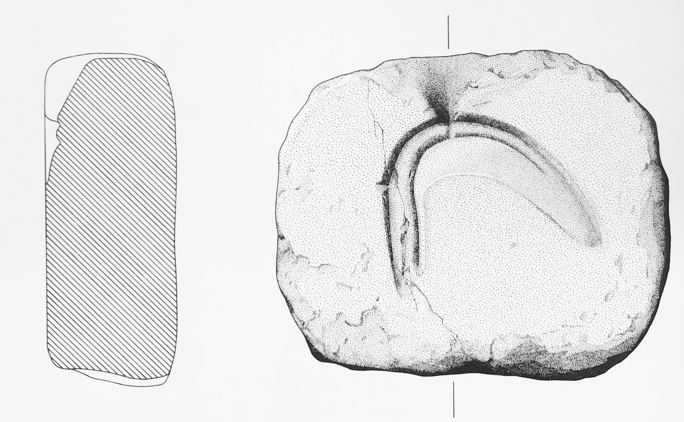 Moule de serpe en molasse découvert à Cortaillod-Est. Tiré de RIBAUX P. 1986 : Cortaillod-Est, un village du Bronze final 3, L’homme et la pierre. Ed. du Ruau, Saint-Blaise. PL. 35.2